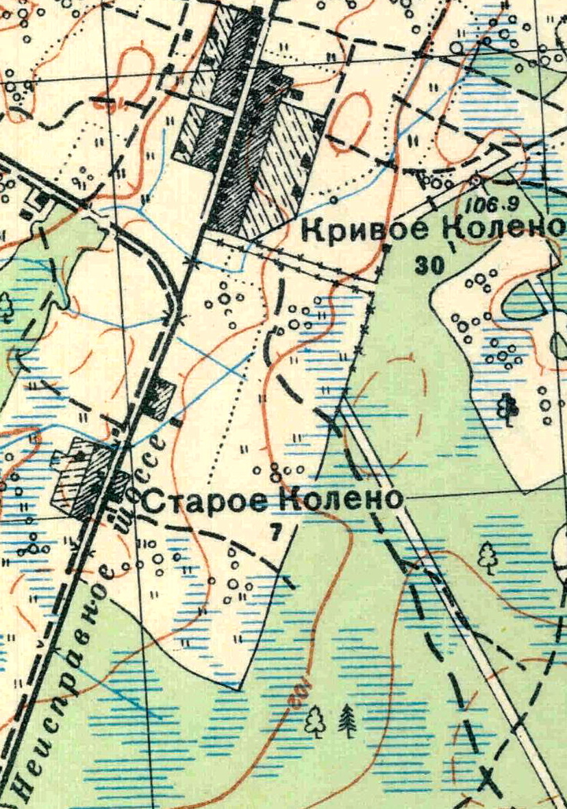 Топографическая карта Ленинградской области, квадрат О-36-13-В-в (Старо-Сиверская), деревня Старое Колено